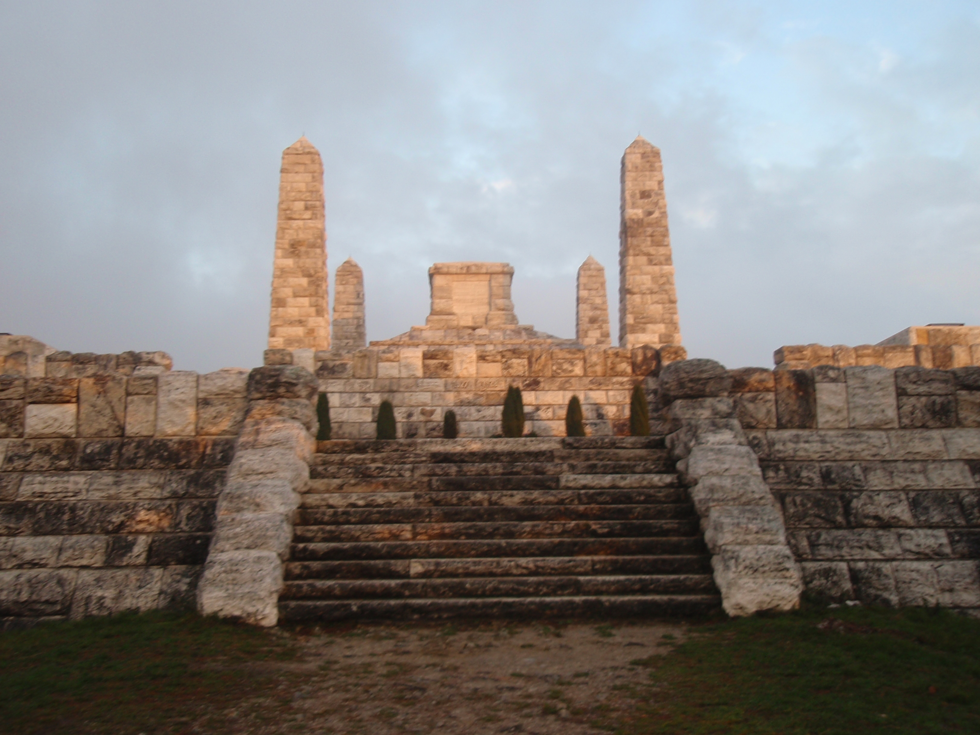 906 15 Priepasné, Slovakia